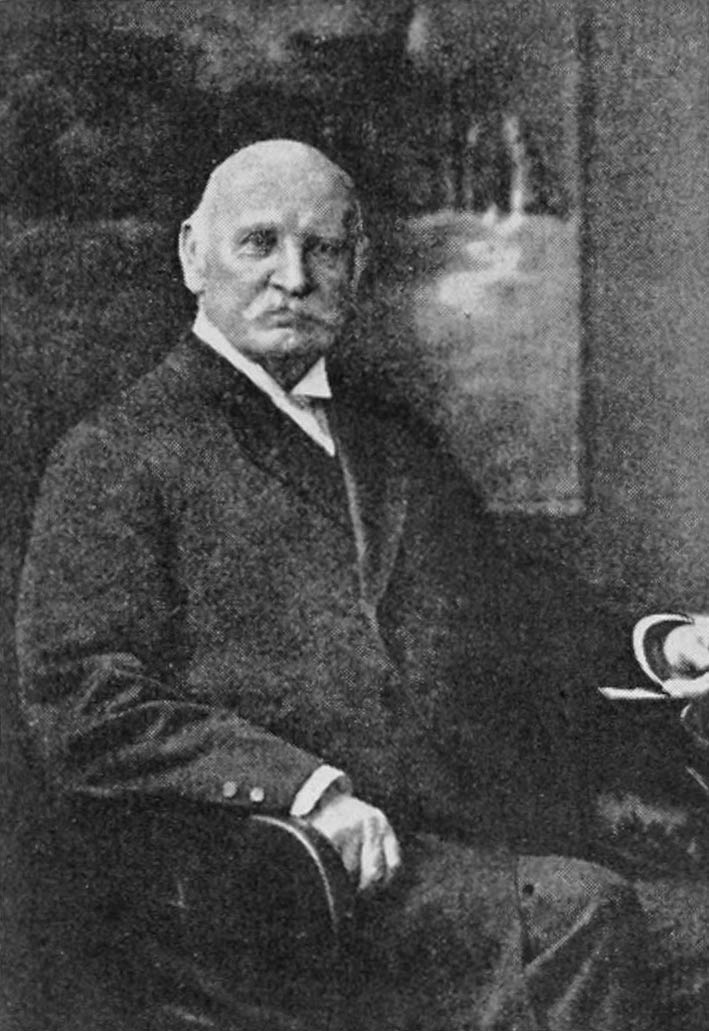 Porträt von Emil Gustav Theodor von Schenckendorff (* 21. Mai 1837 in Soldin; † 1. März 1915 in Berlin), preußischer Reformpädagoge, MdA, Offizier, Reichstelegrafendirektionsrat und Förderer der Sportbewegung.